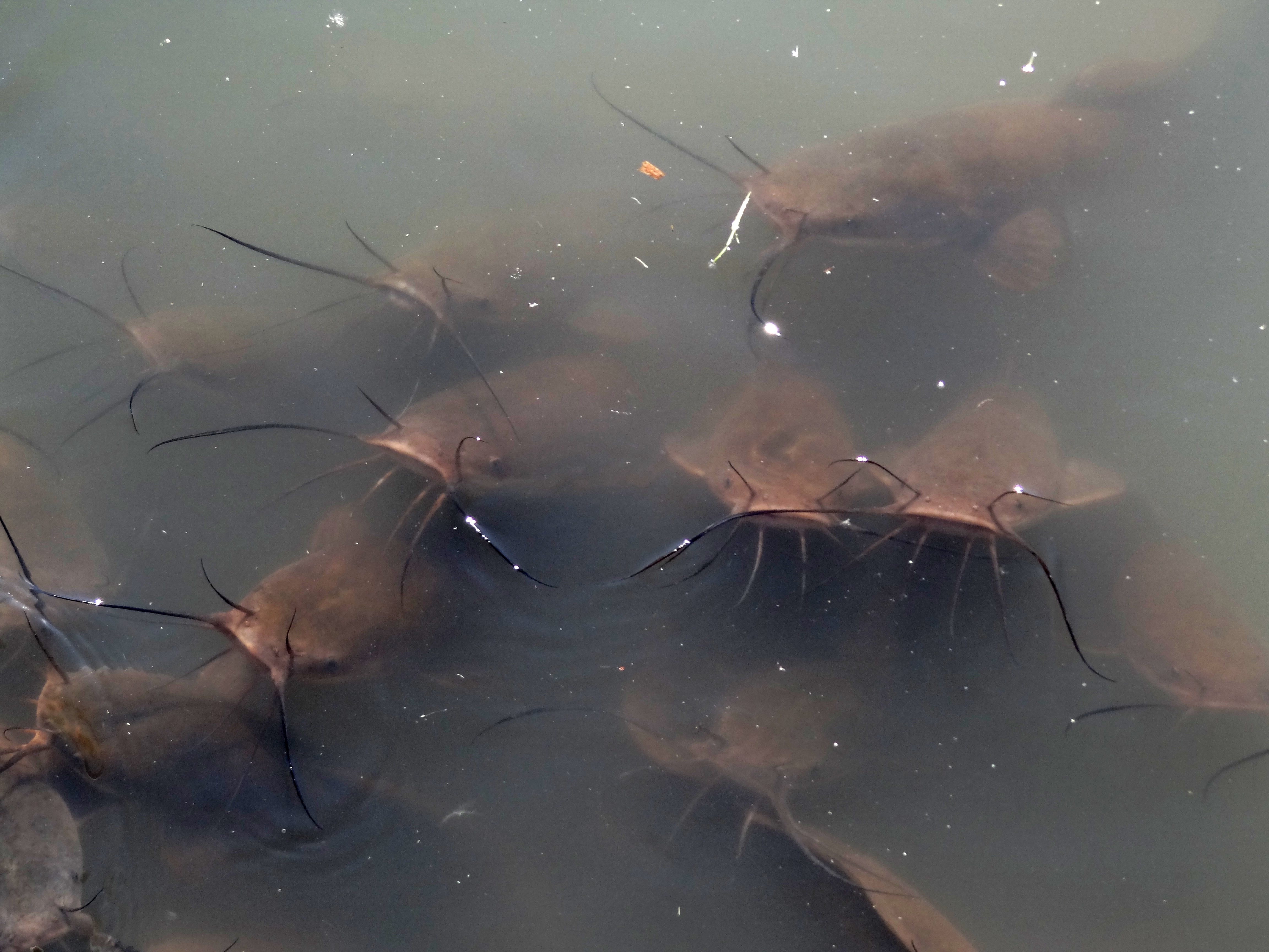 שפמנון בשמורת עין אפק